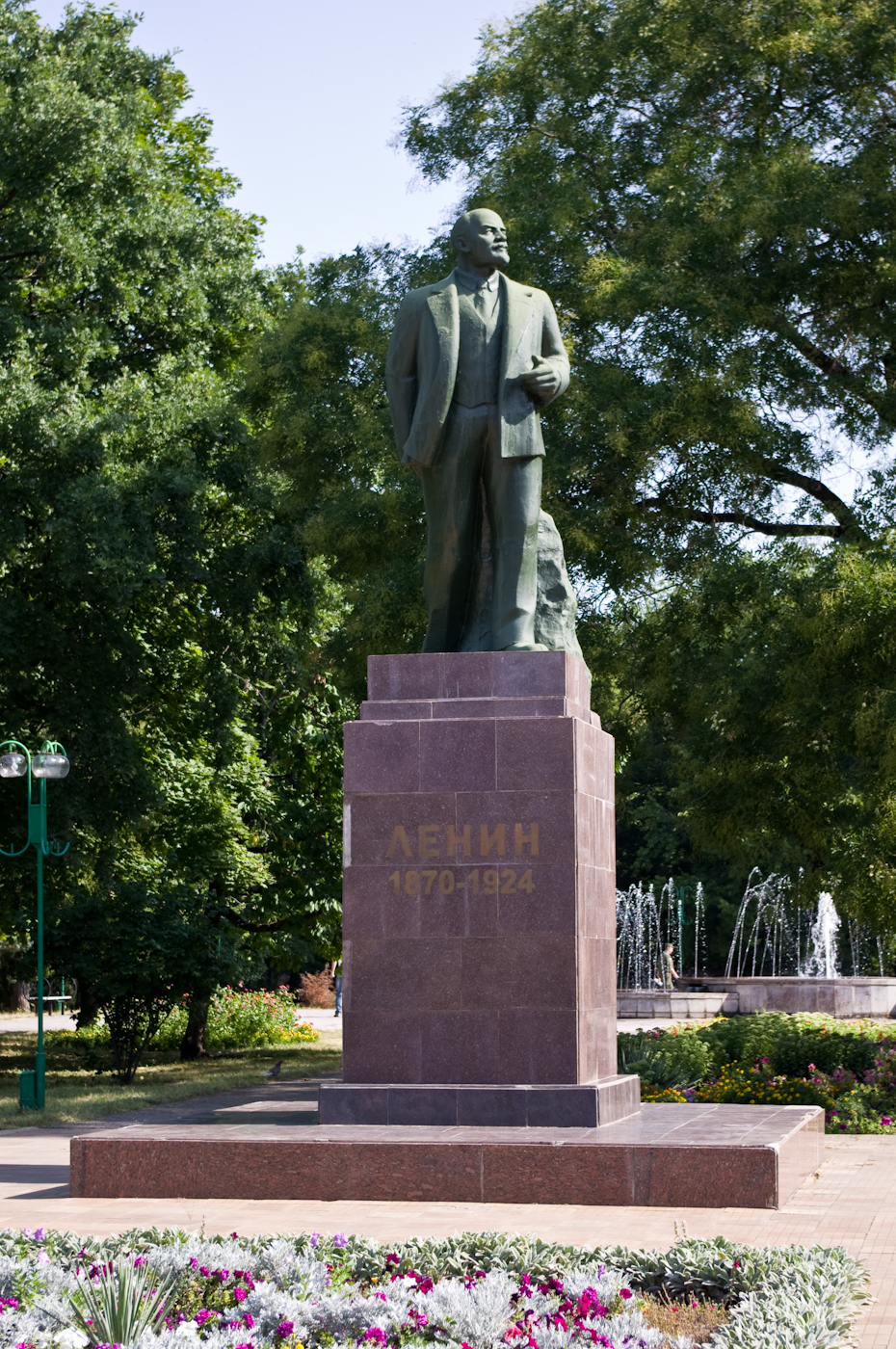 Памятник Ленину в городе Бендеры, Приднестровье. Памятник установлен напротив кинотеатра им.Горького.